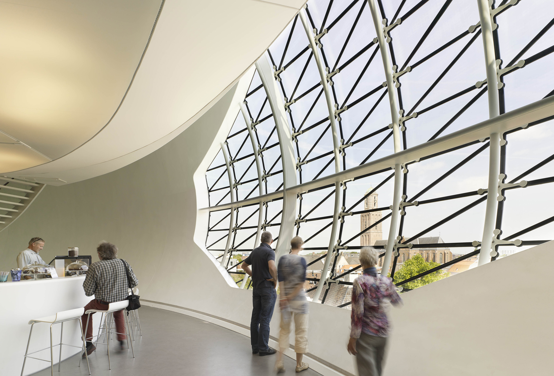 Uitbreiding Museum De Fundatie, Bierman Henket architecten, foto: Joep Jacobs